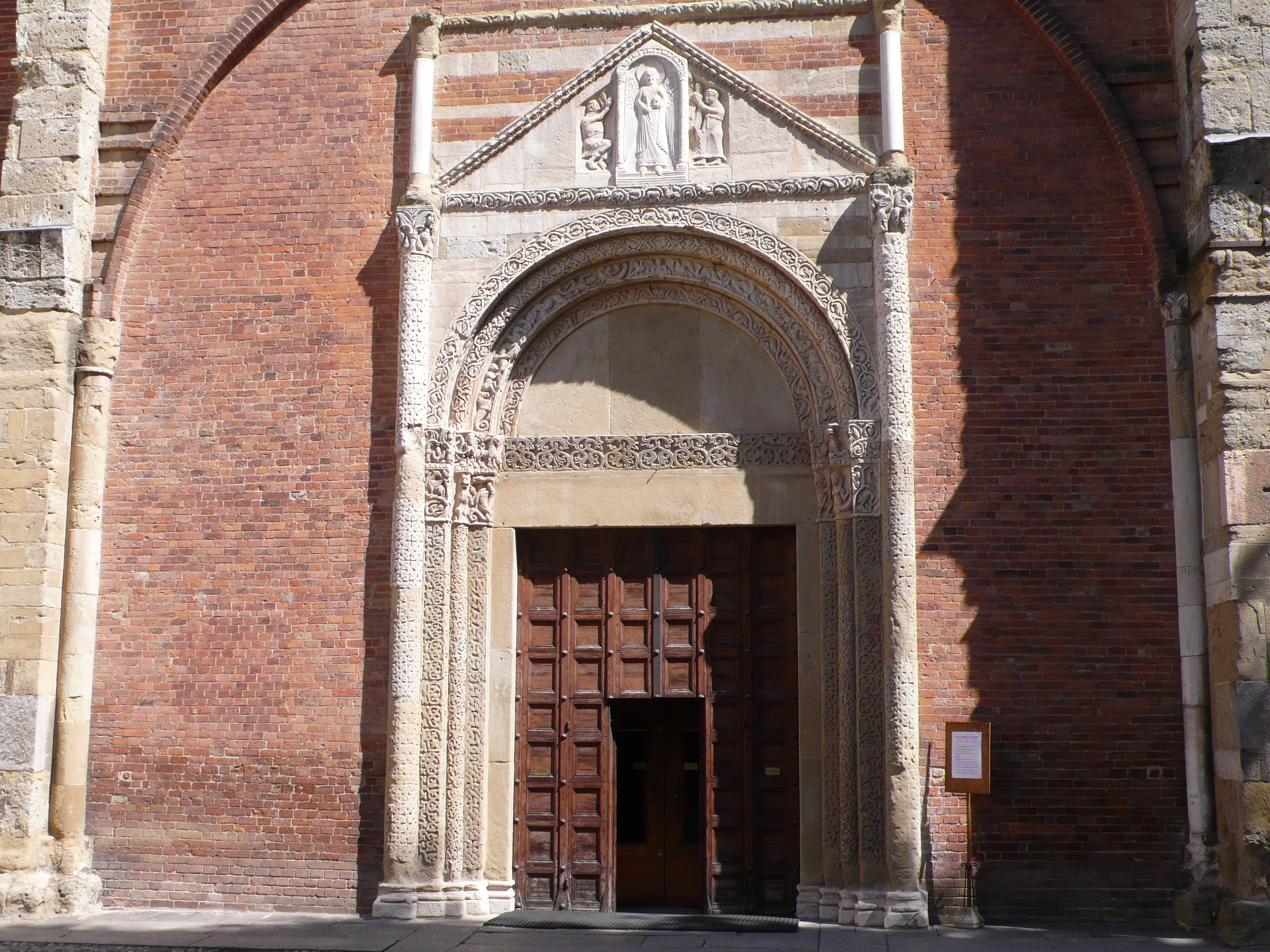 Pavia, San Pietro in Ciel d'Oro, Portal